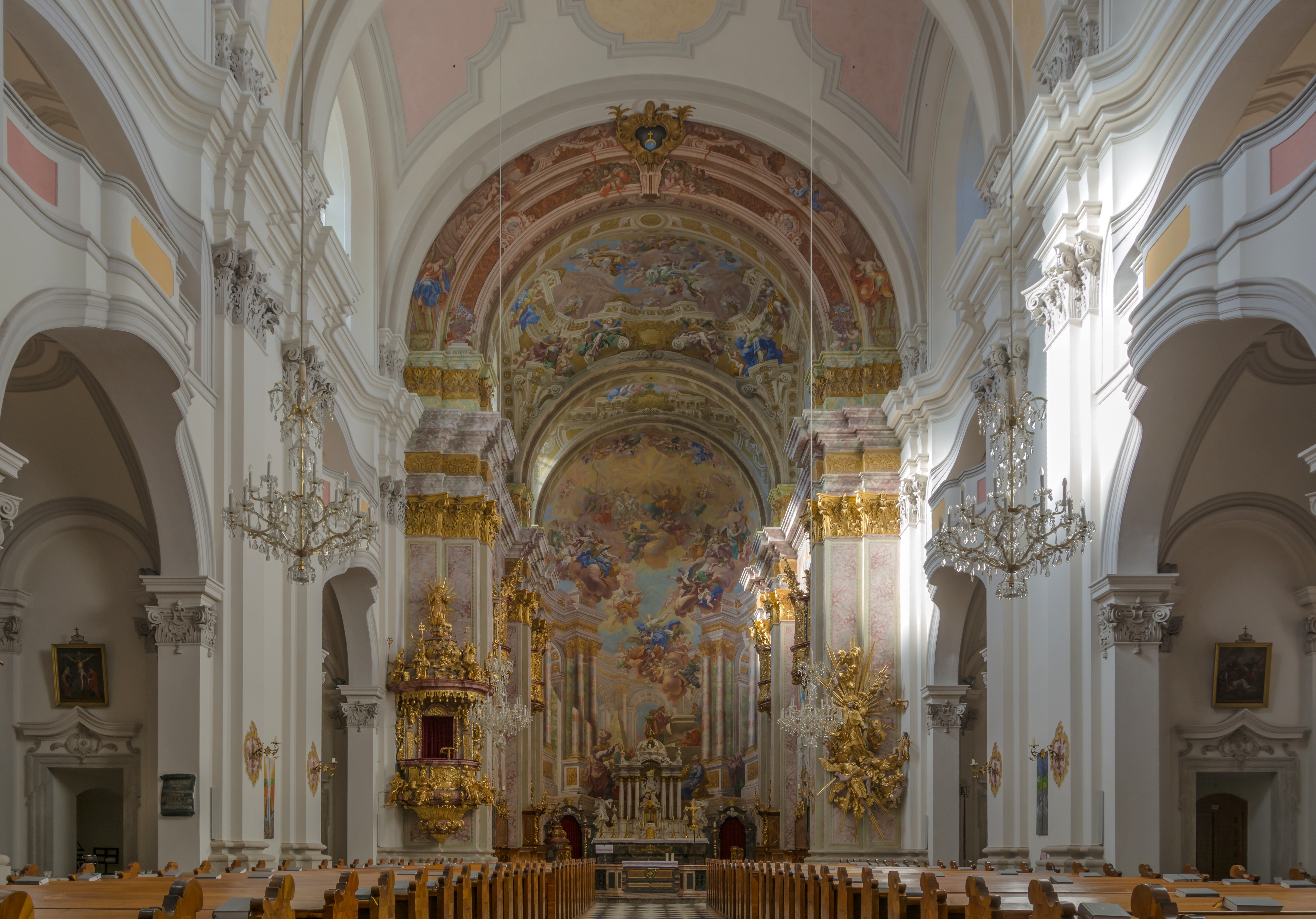 Gesamtanlage ehem. Stift Spital am Pyhrn